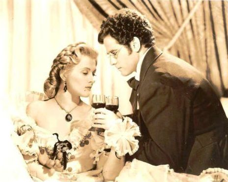 Ilona Massey és Alan Curtis a "New Wine" című filmben